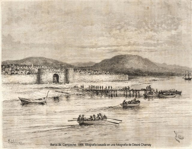 Bahia Campeche — at San Francisco de Campeche, southeastern Mexico.